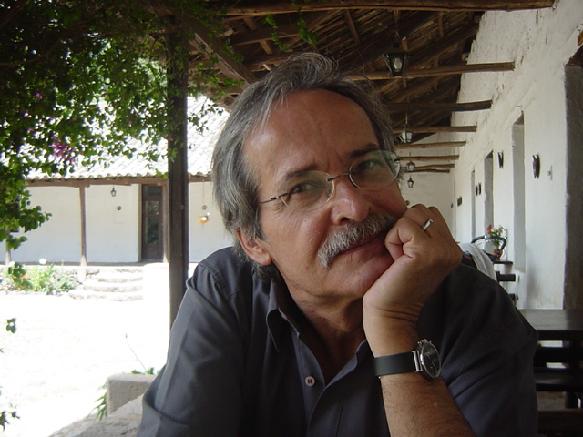 Consulting Ecuador